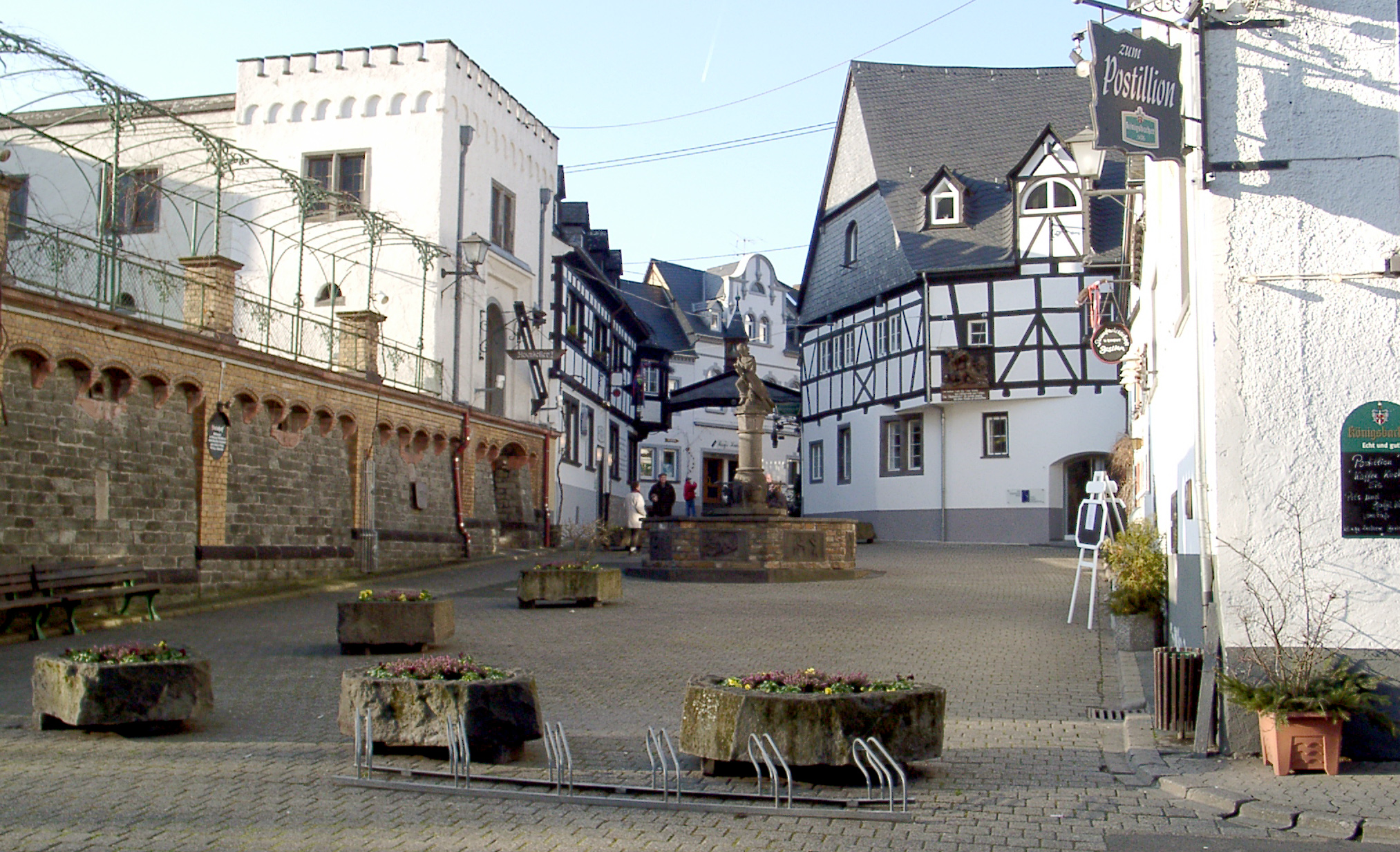 Winningen am Weinhexbrunnen